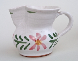 Bukaleta iz Istre u kojoj se poslužuje vino ili Istarska supa tj. Istarska supica